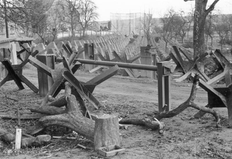 Steinfeld, 7 km ostw. Weissenburg. 1.3.40 Westwall. Strassensperre (Kampfwagenschranke) bei Schweighofen, geöffnet. Heeresfilmstelle ; Bildberichter: Lohmeyer